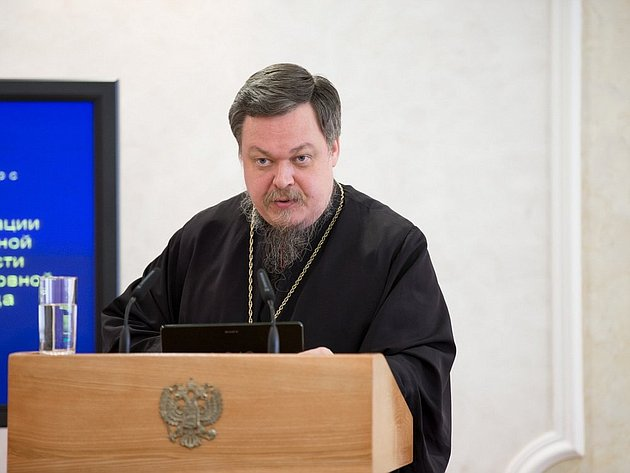 Протоиерей Всеволод Чаплин, в частности, высказался за усиление ответственности за перевод преступлений в экономической и других сферах в межнациональную плоскость.